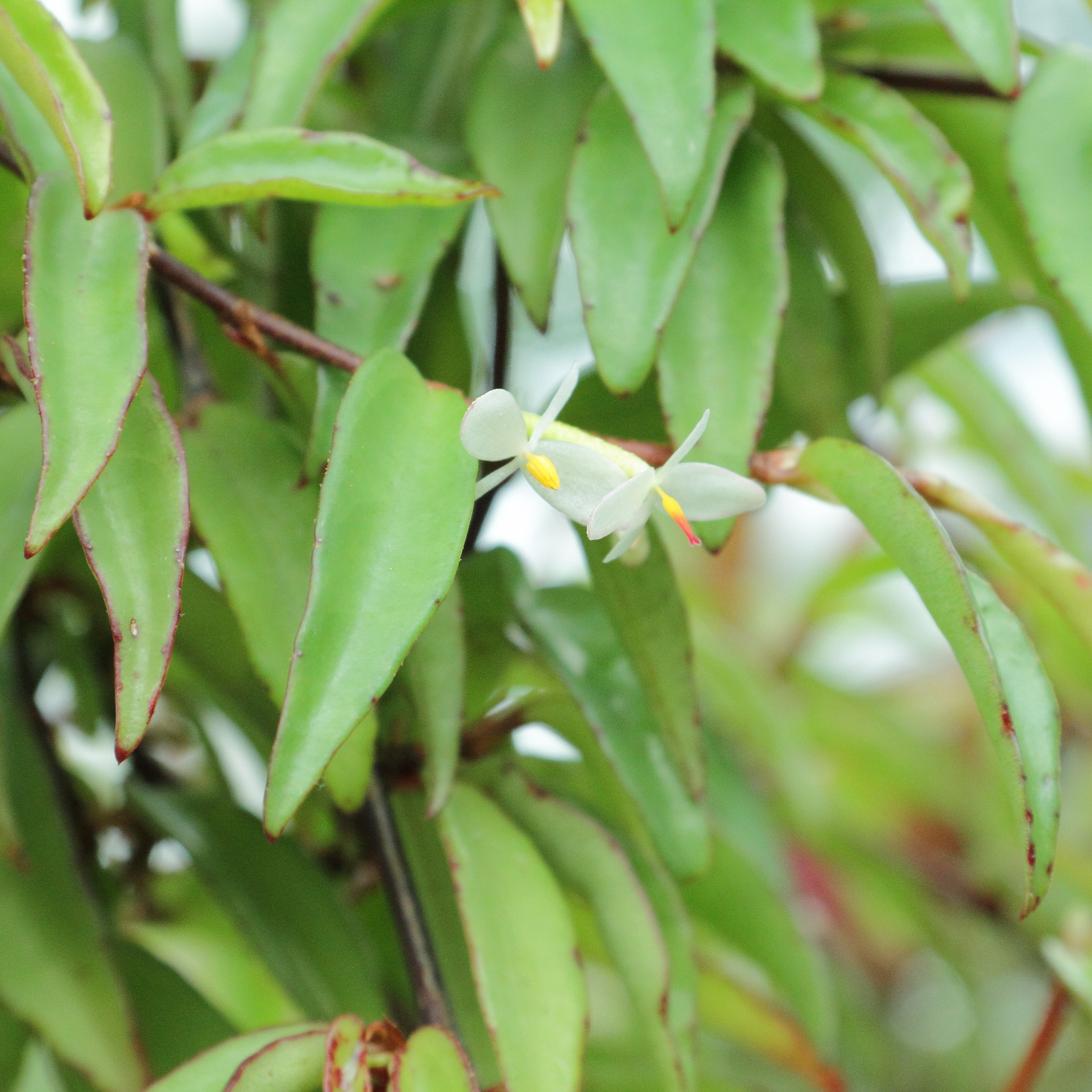 Begonia oxyanthera at Uppsala Botanic Gardens